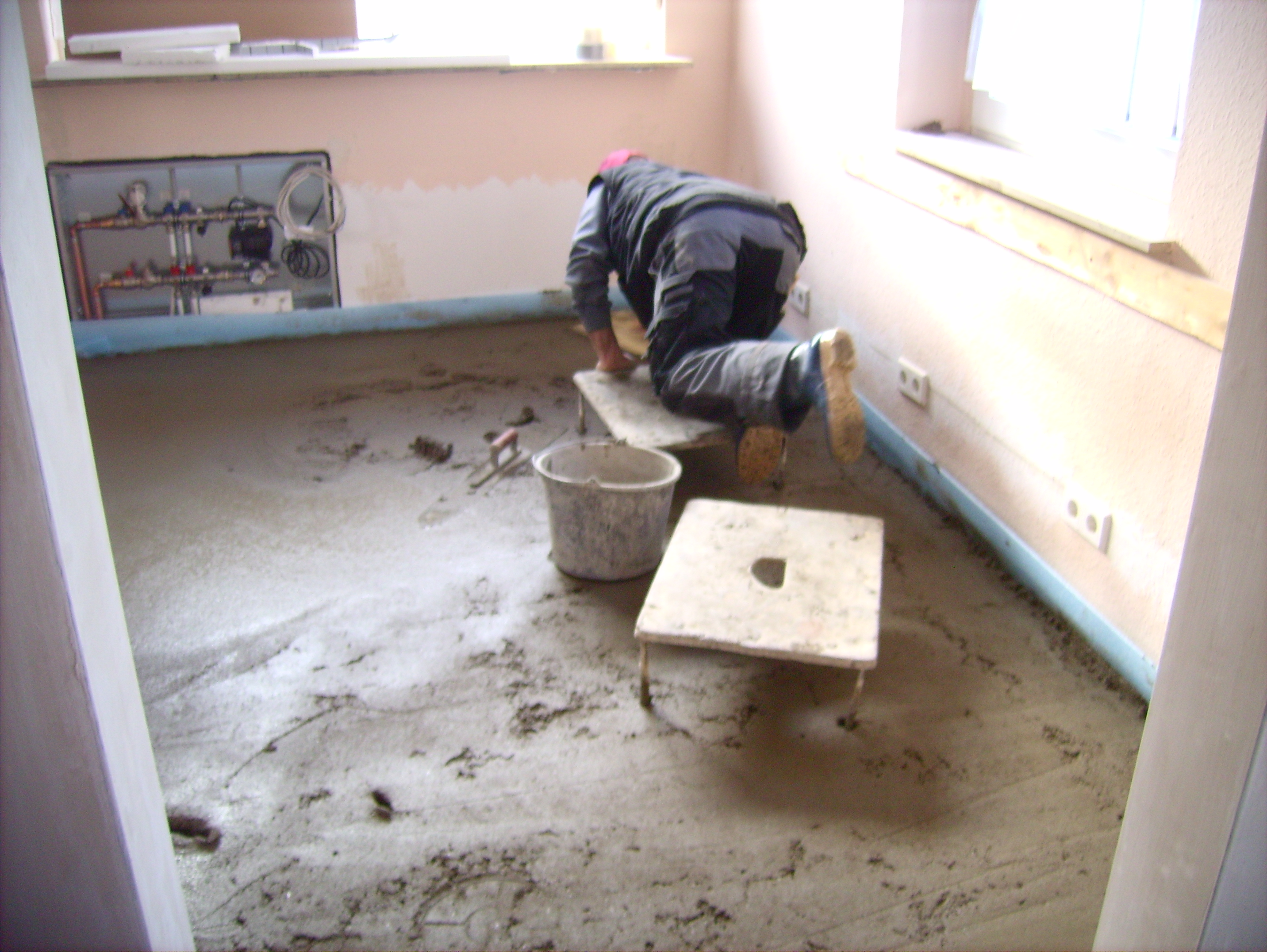 Estrich-Glättung